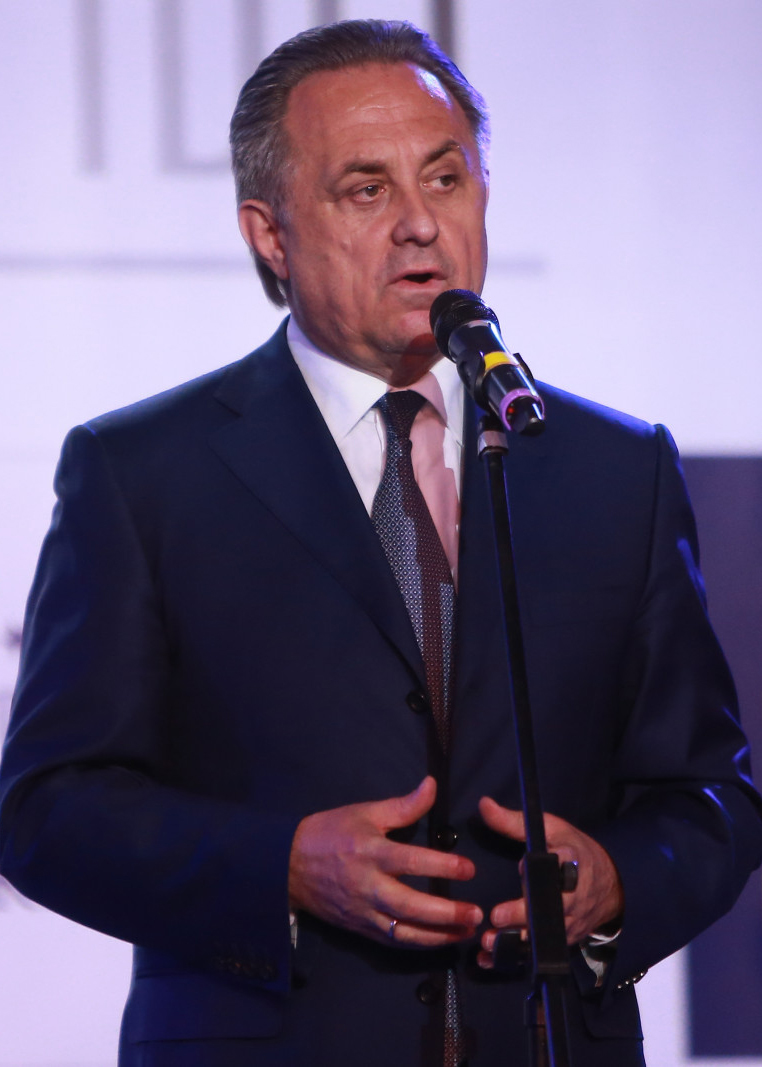 Вручение премий РФПЛ